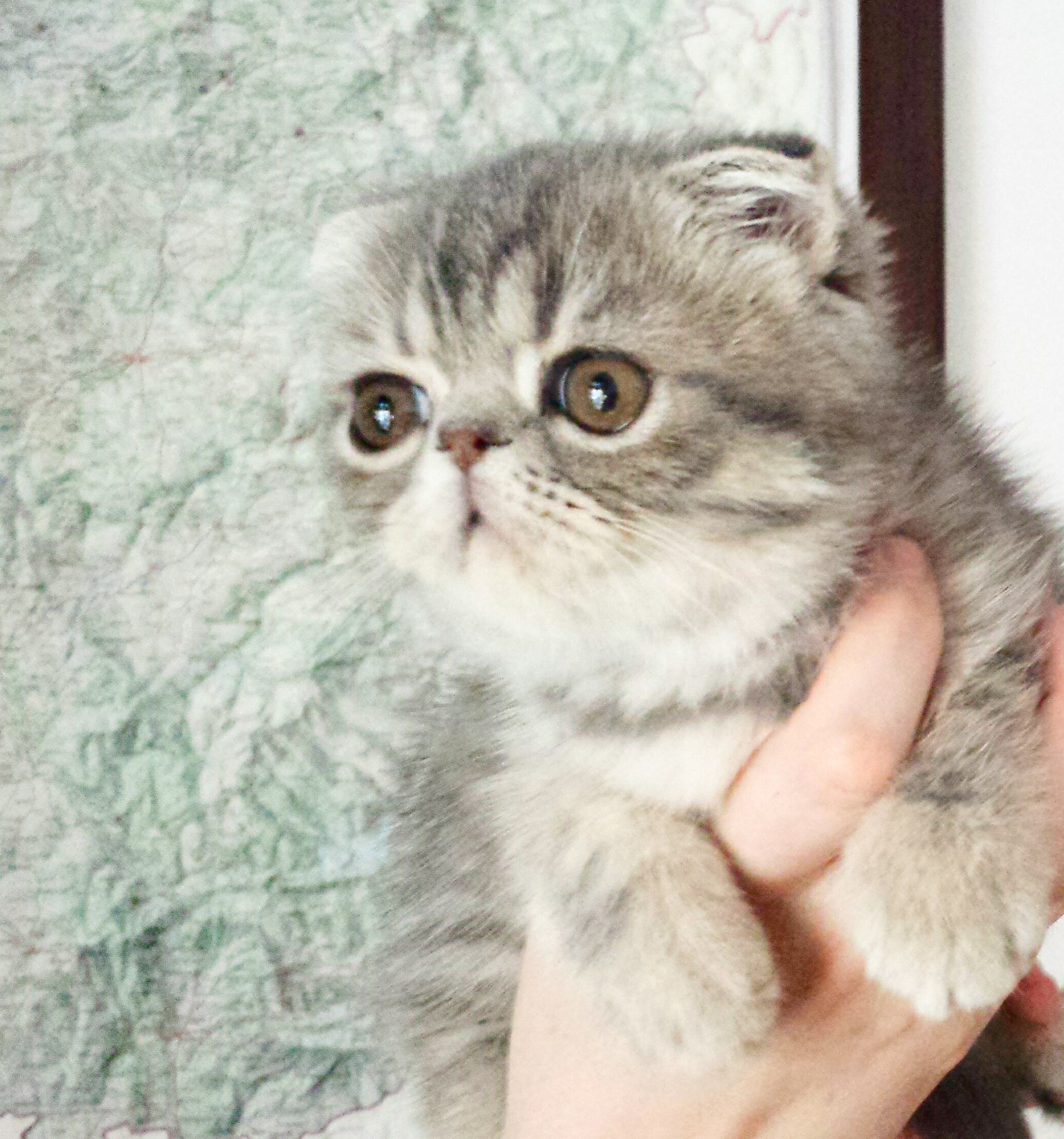 Cachorro de Gato de Raza FoldEx, Azul Tabby Spotted ("Belisario del Laberinto").